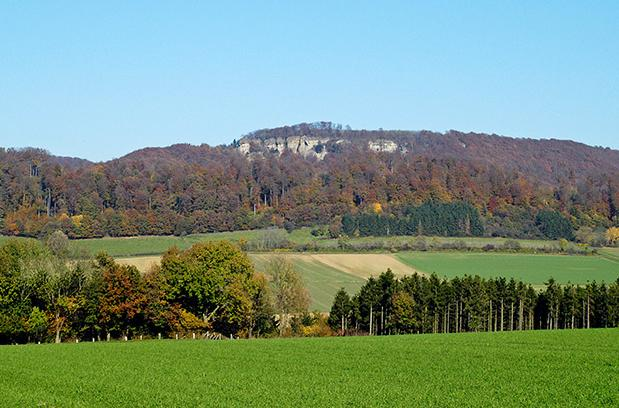 der Hohenstein (Süntel) im Herbst 2005